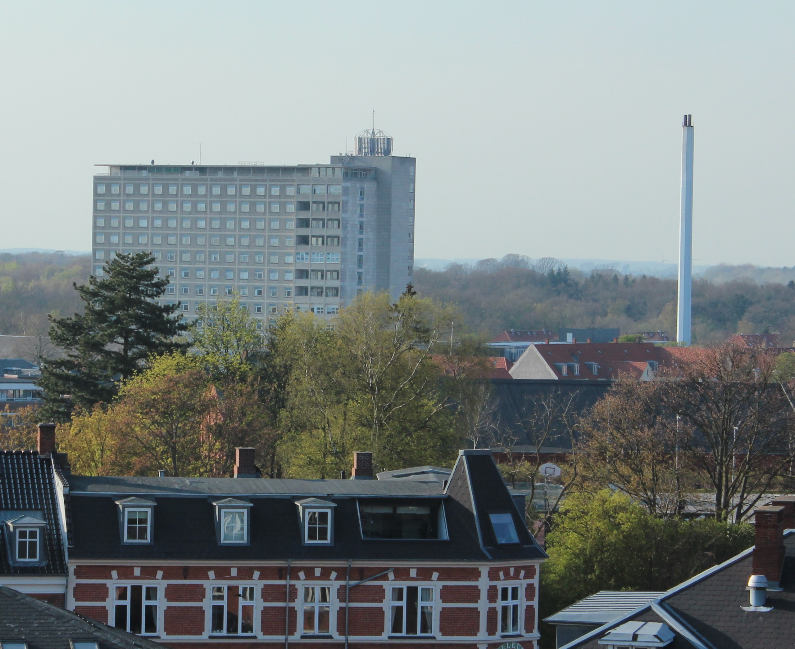 Sygehuset set mod nord fra Munkebakken